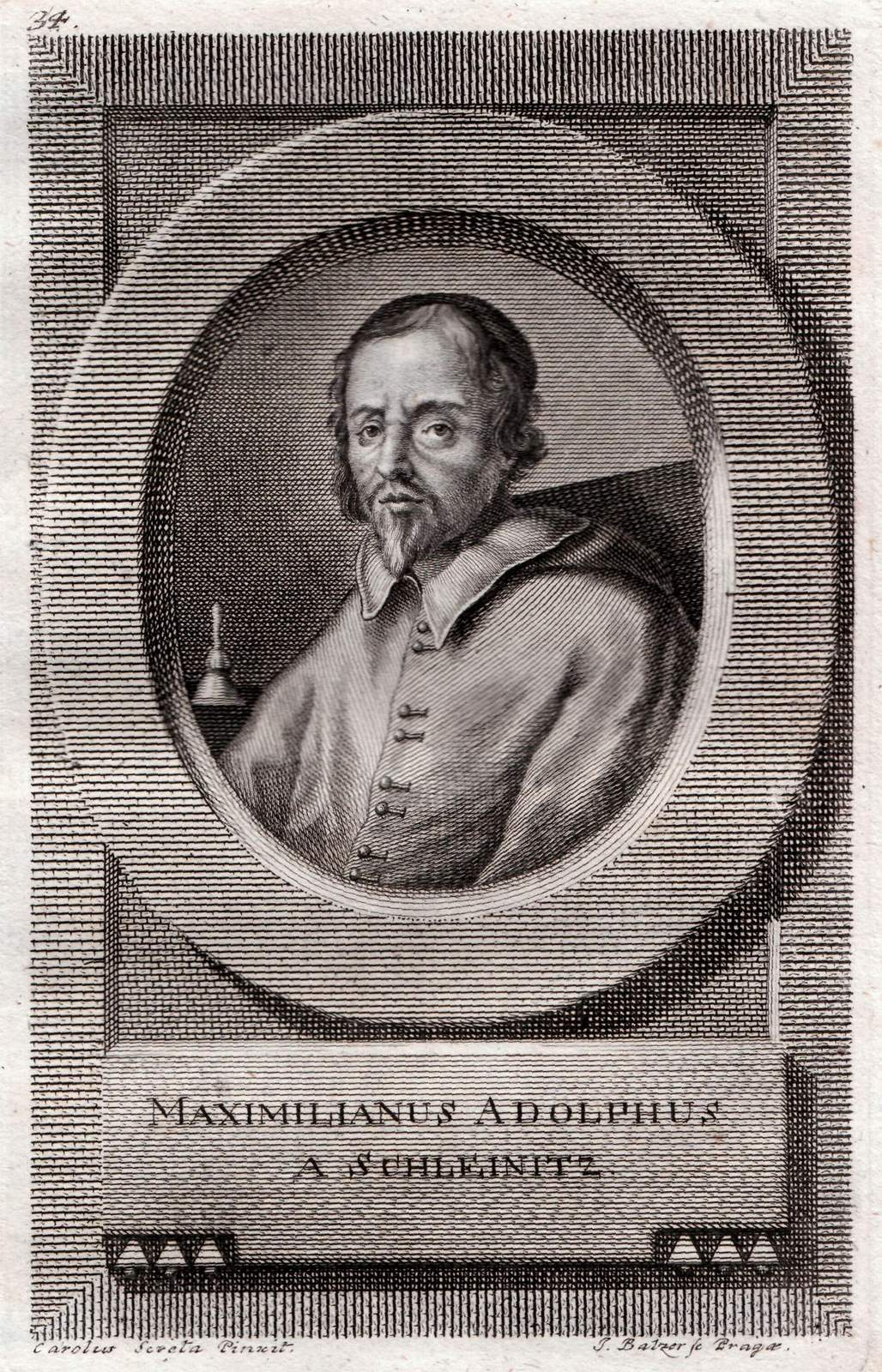 Maxmilián Rudolf svobodný pán von Schleinitz (1606—1675)